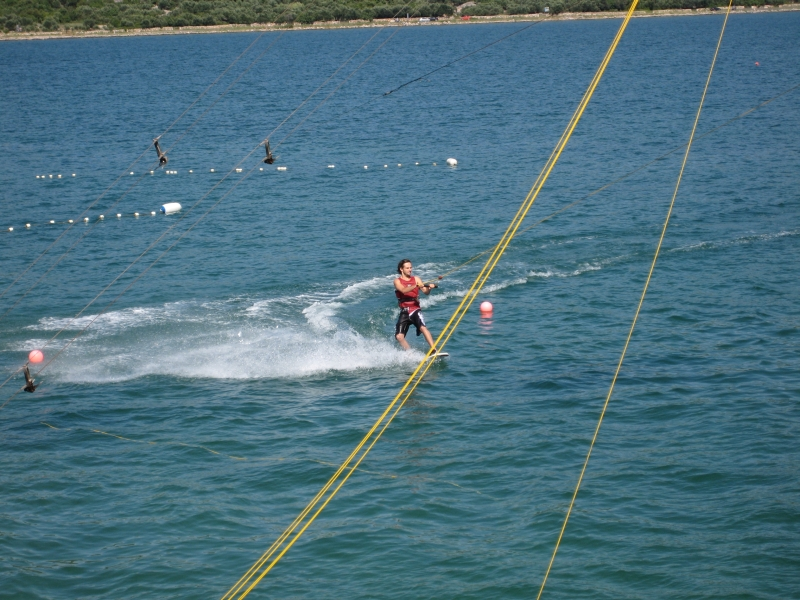 Wakeboarding, Punat, Croatia